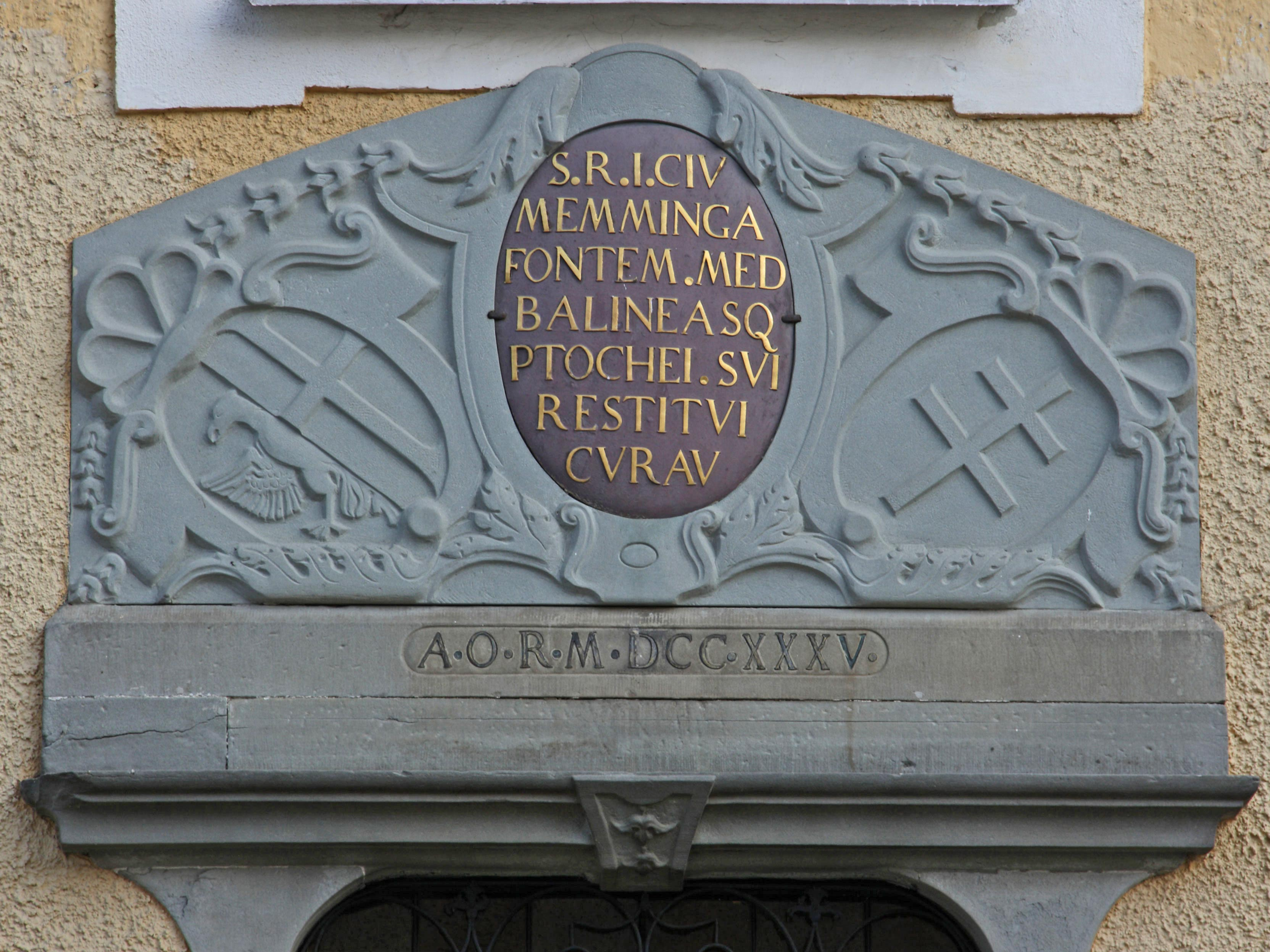 Architrav über dem Badhauseingang mit Inschrift (übersetzt: Des heiligen Römischen Reiches Stadt Memmingen ließ die Heilquelle und das Bad seines Spitals neu errichten) und Wappen der Reichsstadt Memmingen und des Unterhospitals. Darunter die Jahreszahl 1735.